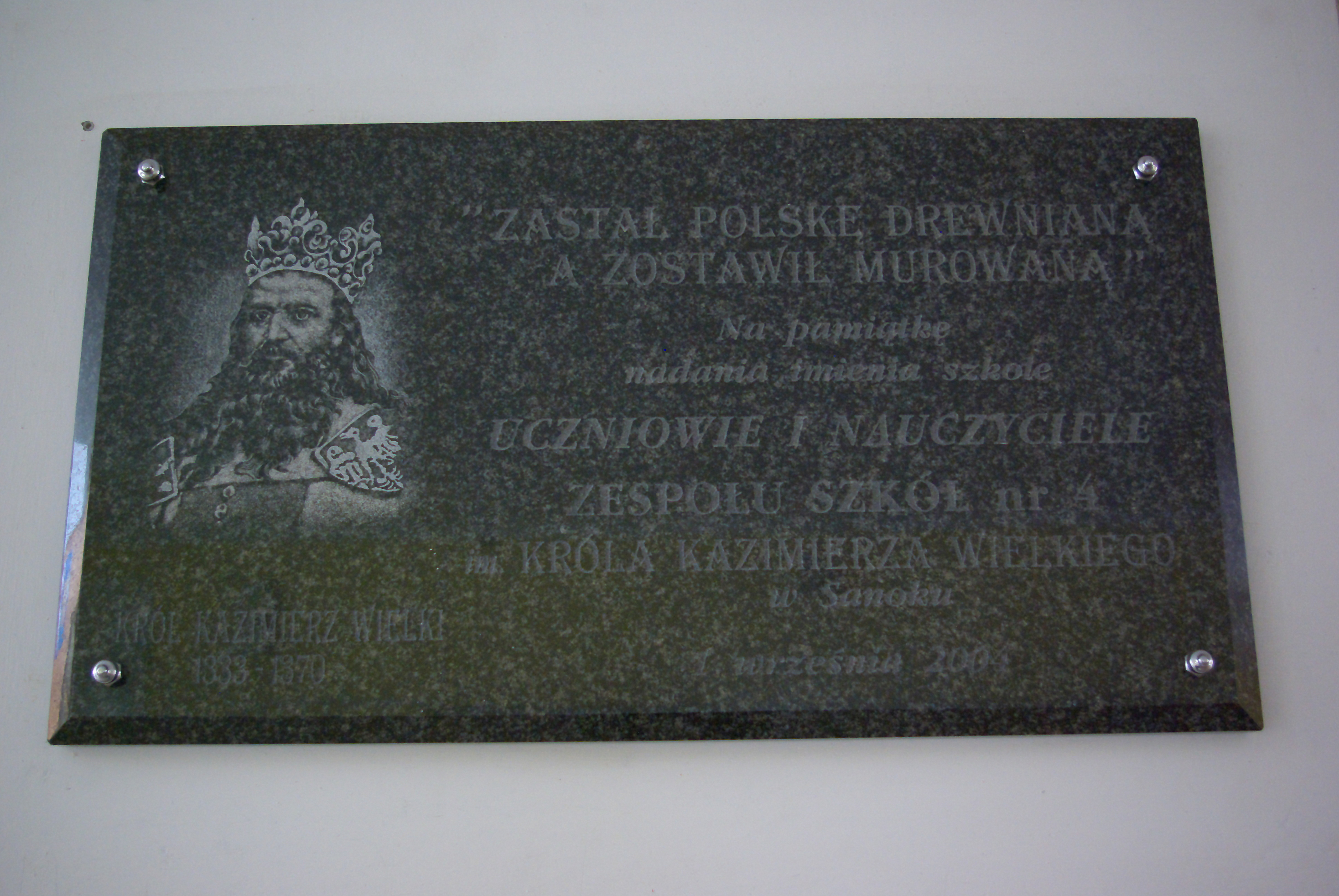 Zespół Szkół nr 4 im. Króla Kazimierza Wielkiego w Sanoku. Tablica pamiątkowa